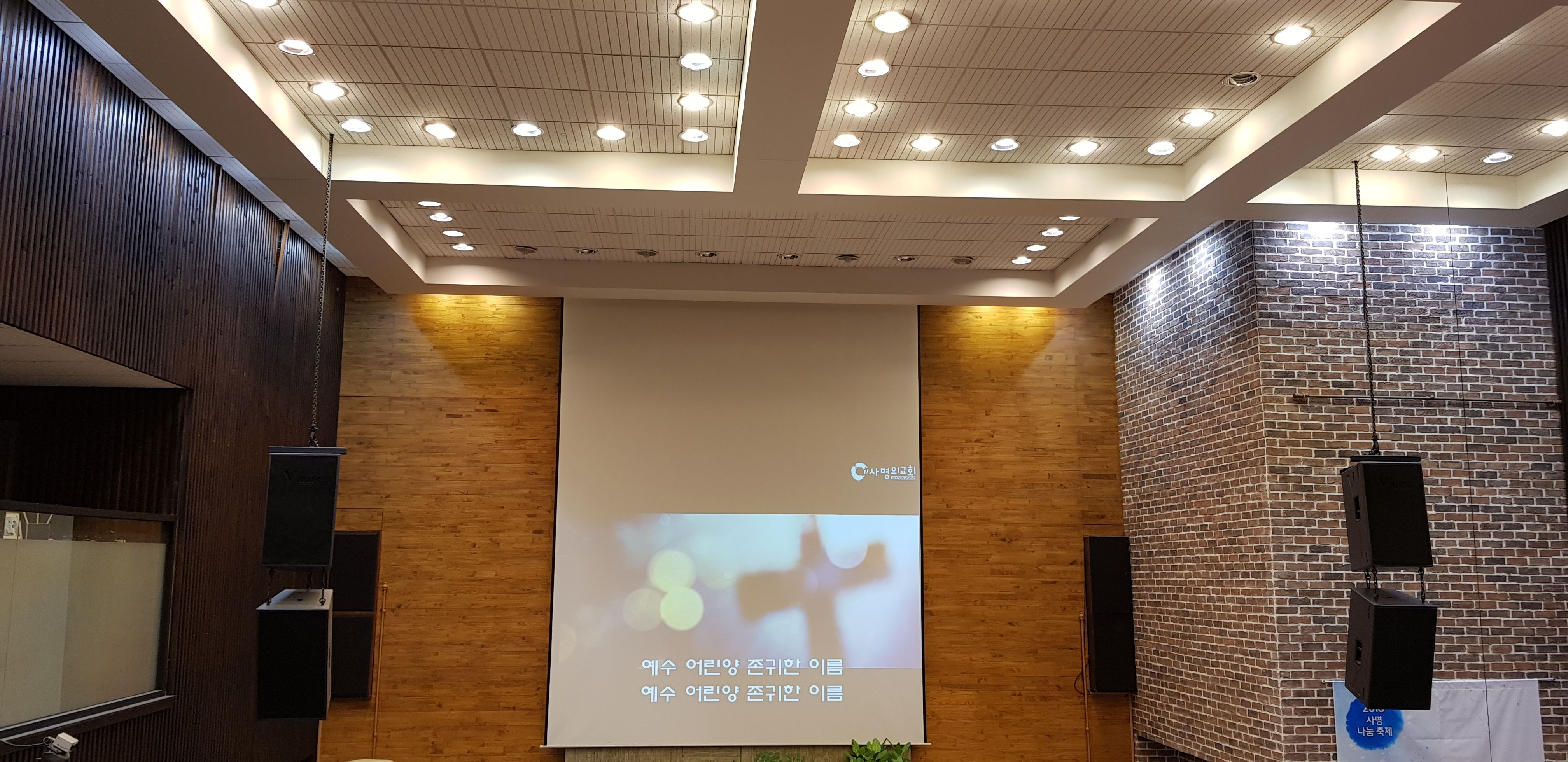 에수 그리스도에 대한 존귀한 존칭으로 하나님의 어린양